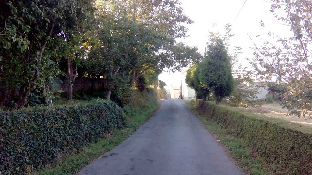 Vista de Condós, Paderne.